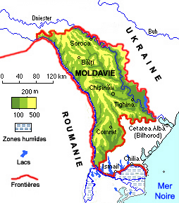 Moldavie